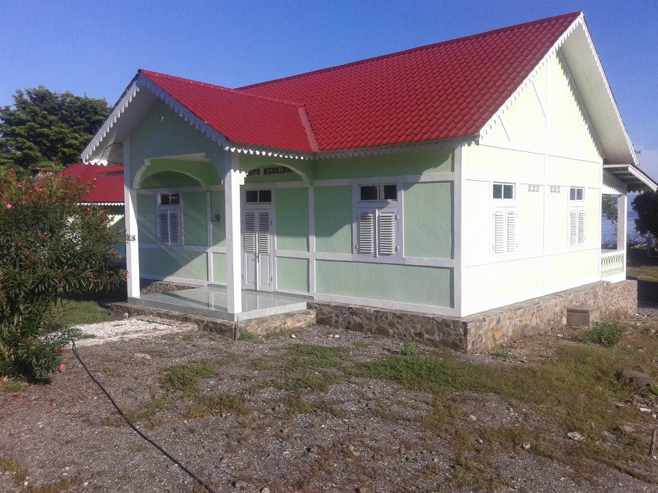 Maubara